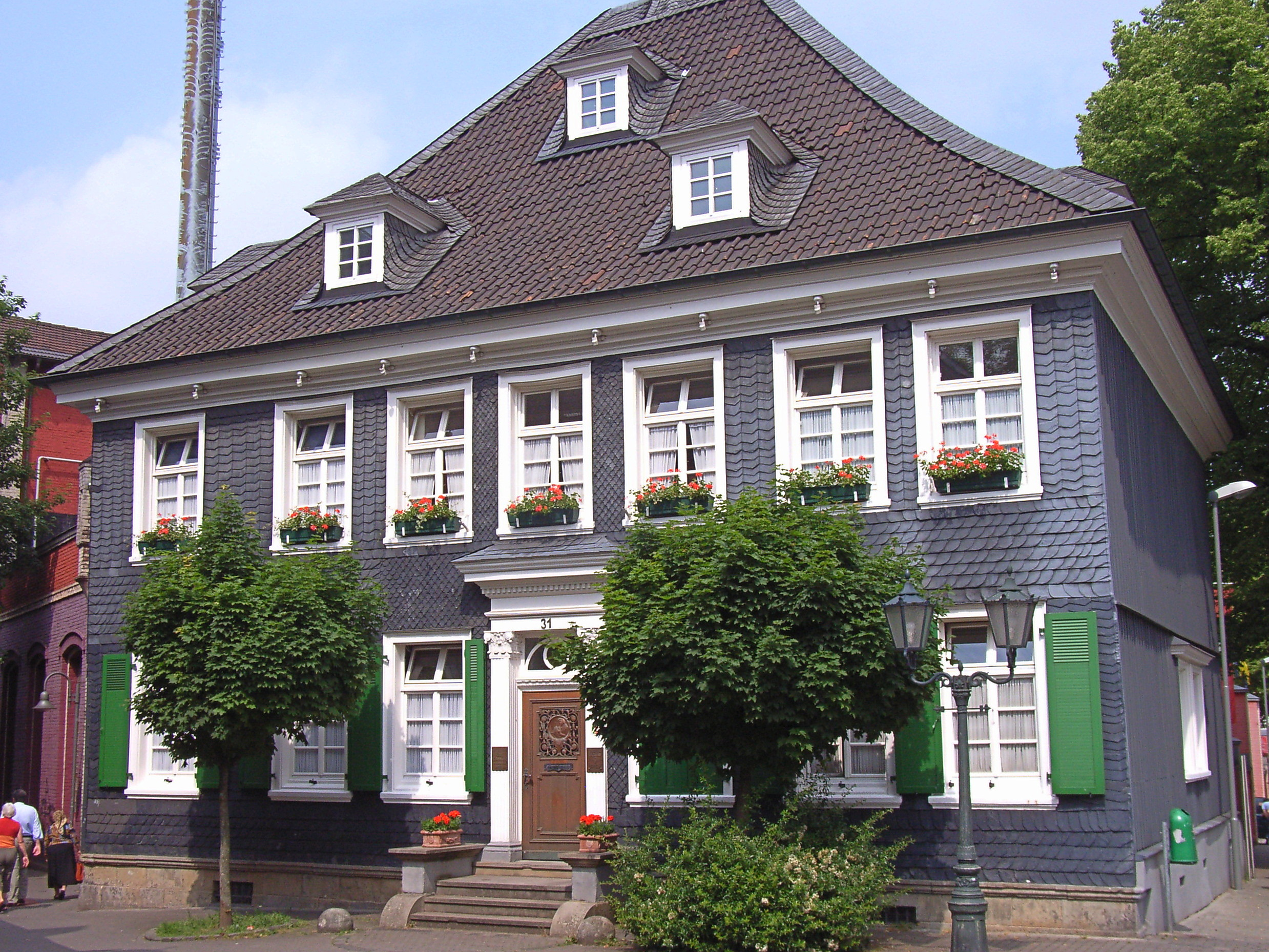 Denkmalgeschütztes Haus Nr. 31 an der Untermauerstraße in Schwelm (Rietz'sches Haus, erbaut vor Beginn des 18. Jahrhunderts)